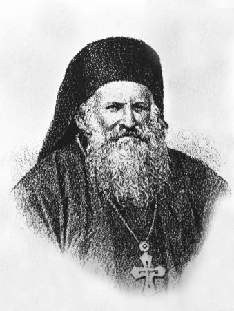 Патриарх Иерусалимский Кирилл II